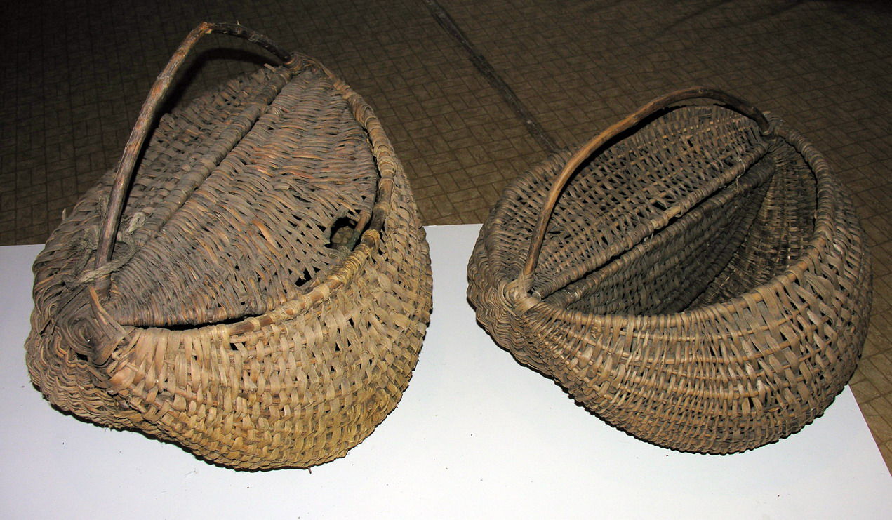 Kašikas– įvairaus dydžio pintas krepšys su dangčiu